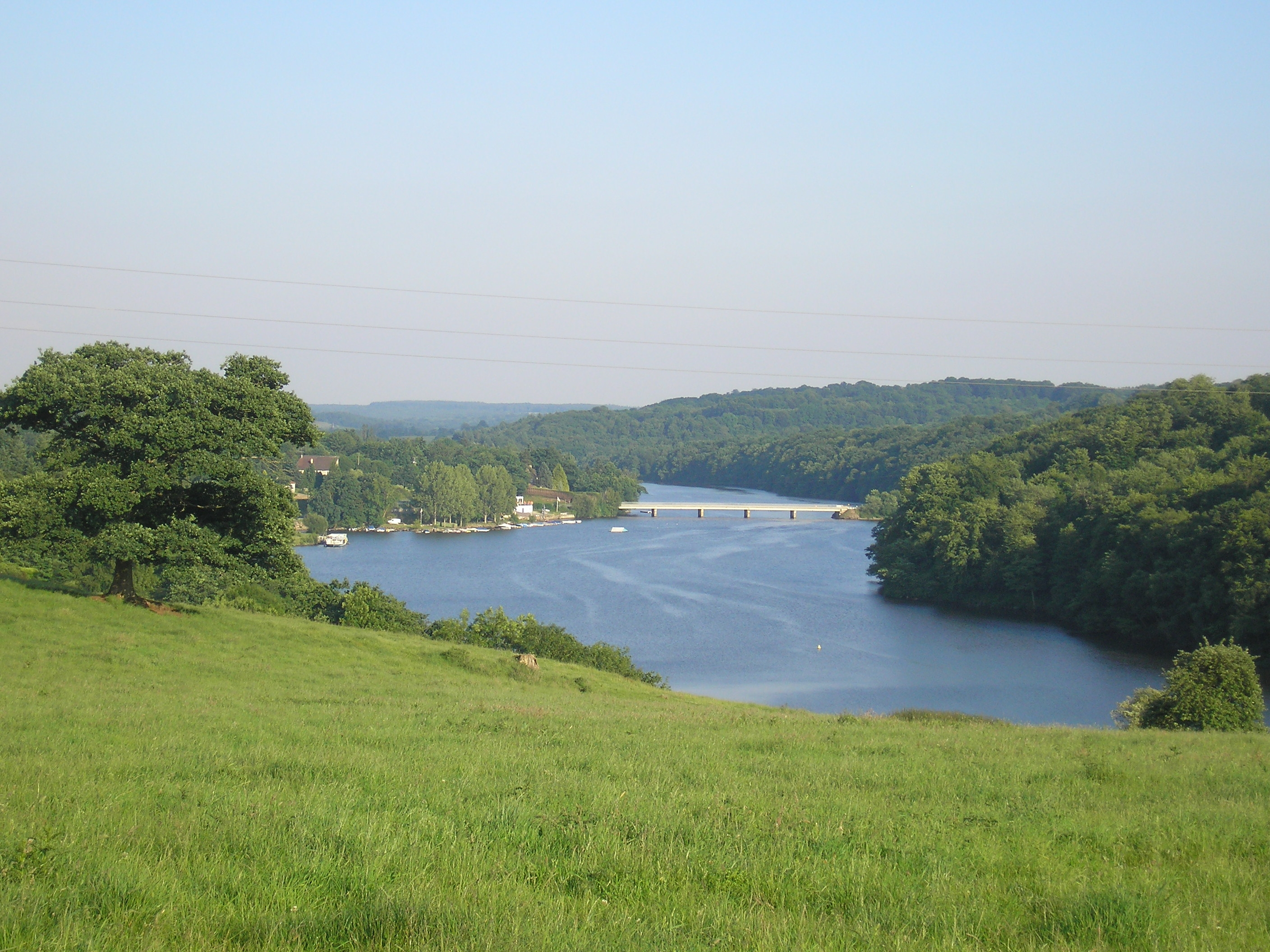 Rabodanges (Normandie, France). La retenue d'eau sur l'Orne. Au premier plan à gauche, territoire de Rabodanges, à droite Saint-Aubert-sur-Orne ; à l'arrière-plan à gauche Les Rotours, à droite Sainte-Croix-sur-Orne.